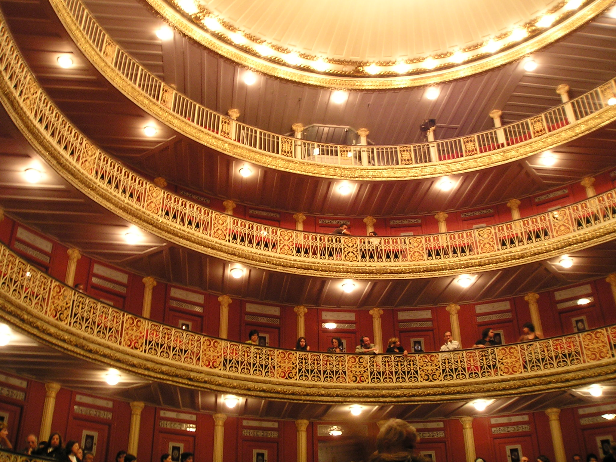 O interior do Teatro Santa Isabel